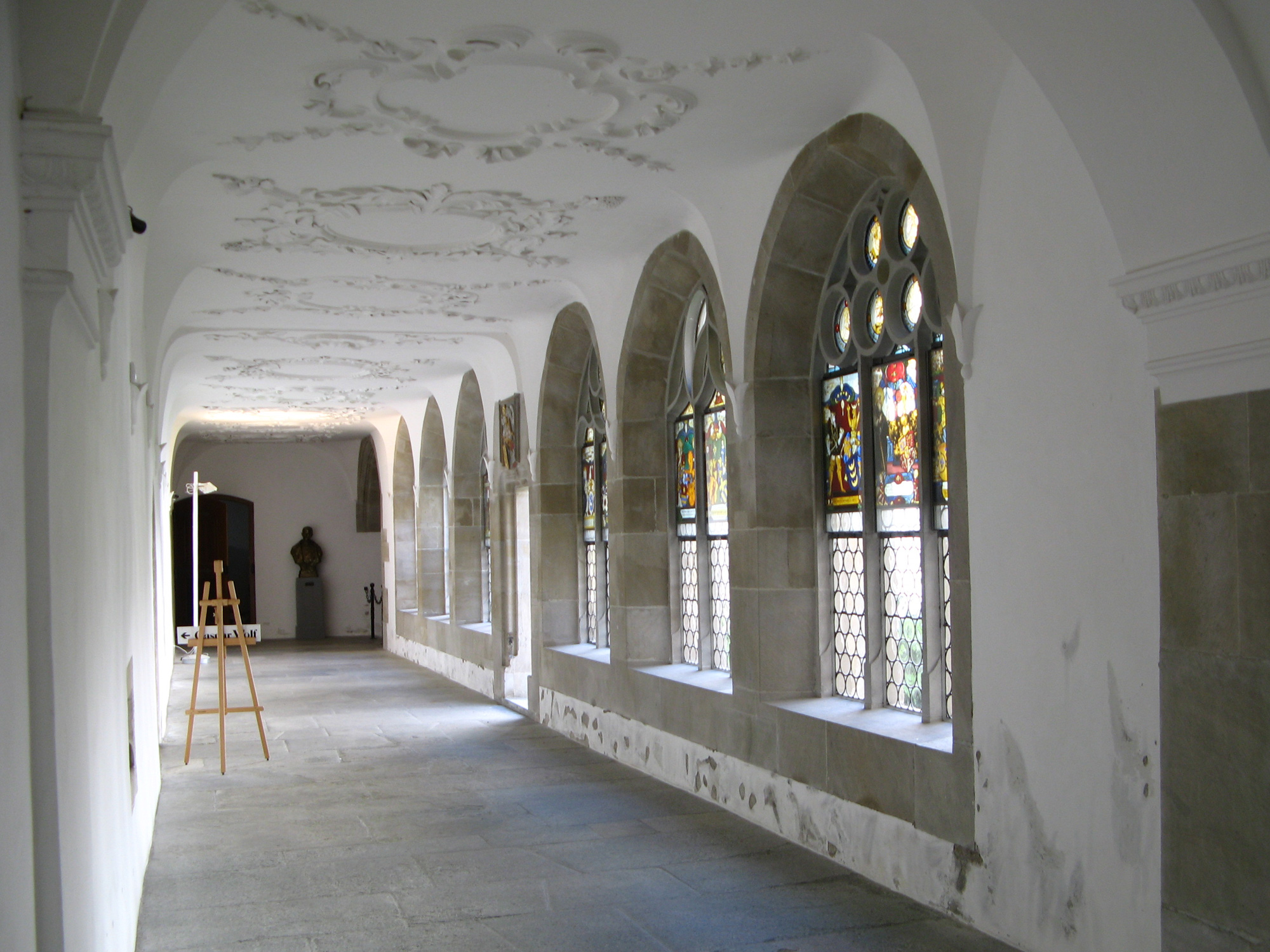 Ansicht des Kreuzgangs im Kloster Muri mit Glasfenstern (Westtrakt)